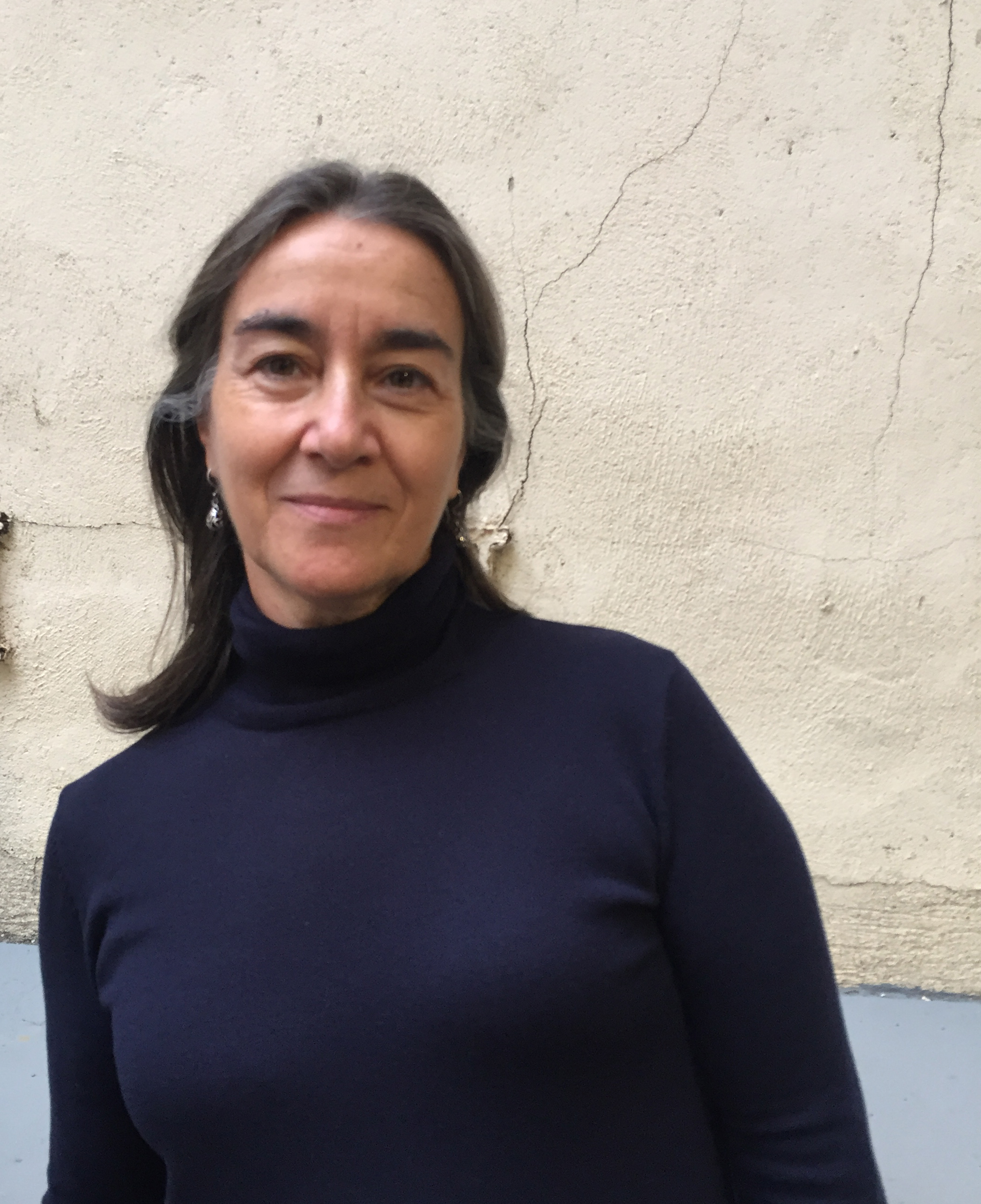 En asamblea MAV en Madrid 2018